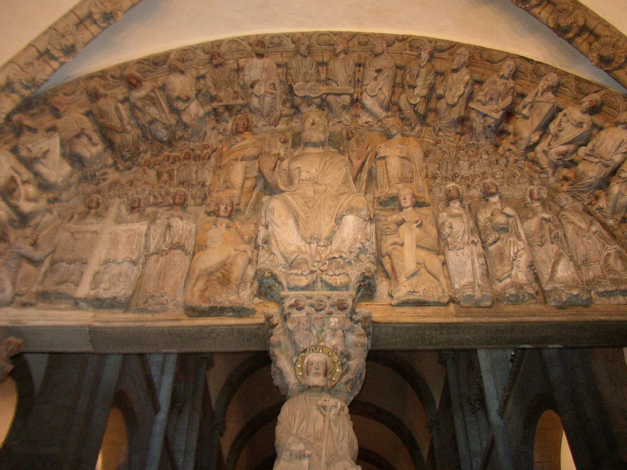 Toda la obra del Pórtico se debe al Maestro Mateo, el artista más importante de su tiempo, que firmó su creación en los dinteles de los arcos tras su colocación, en 1188.